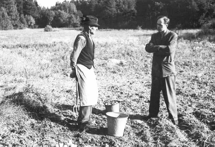 Torpet Råsten, Viksjö, Järfälla. Torpet låg under Viksjö gård. Till vänster siste torparen August Flyman och till höger Lars Gustafsson j:r stående i potatislandet.